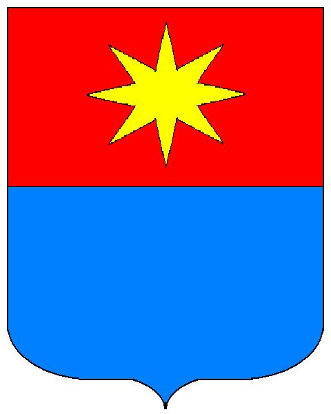 Grb obitelji Detrico